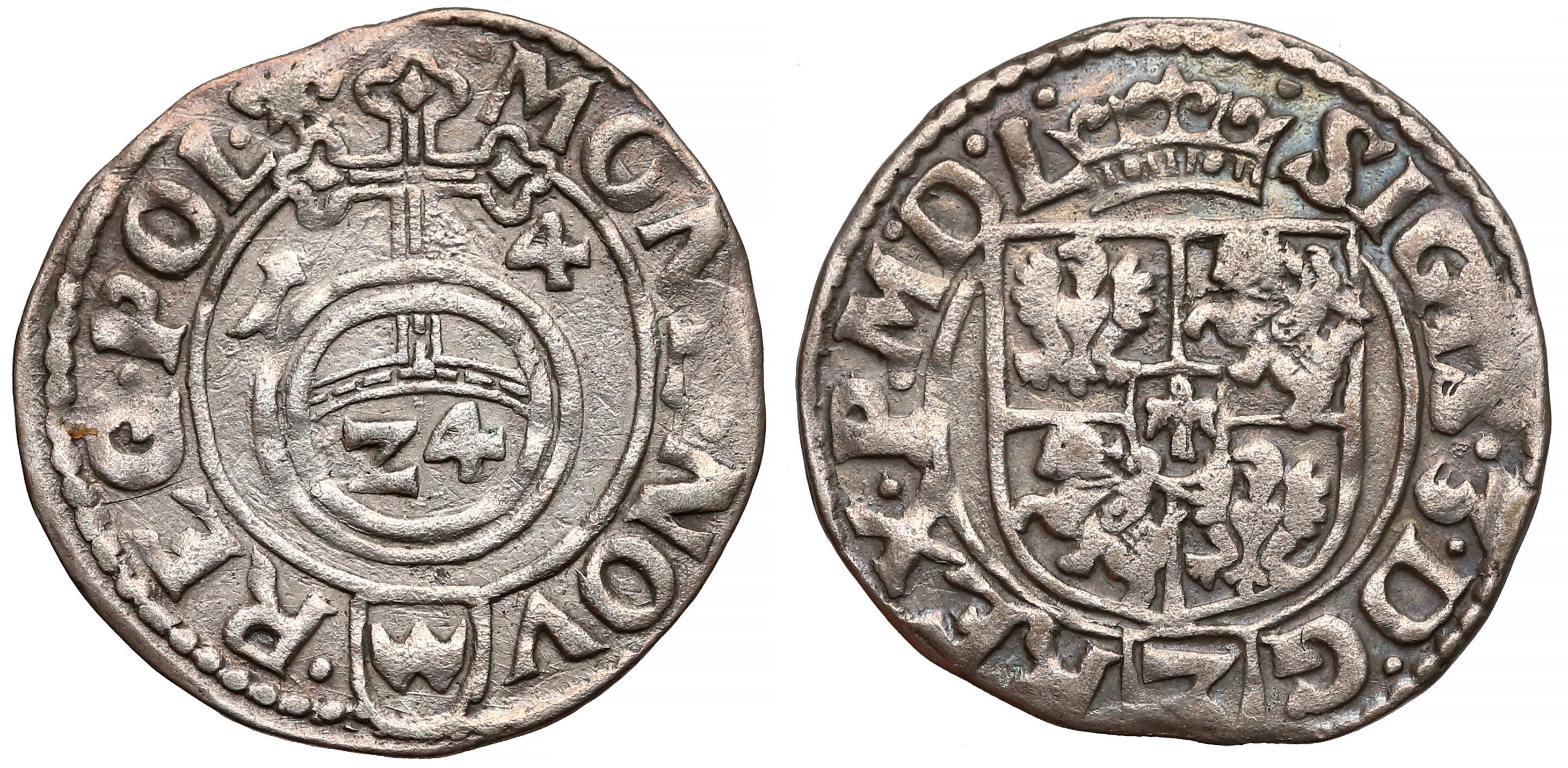 Półtorak koronny 1614 Kraków